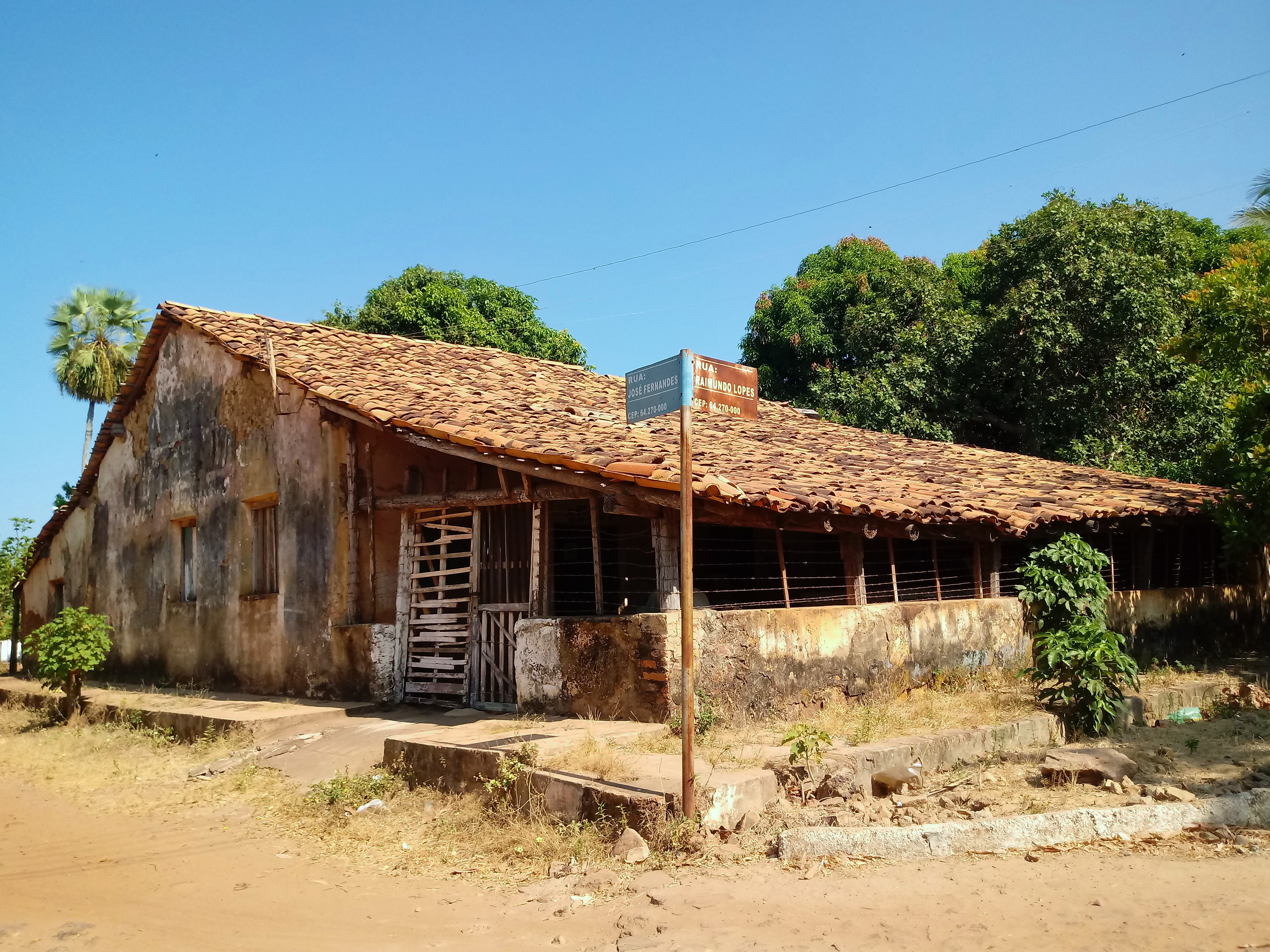 Casa de Fazenda da Dona Alemã com as placas das ruas Raimundo Lopes & José Fernandes.